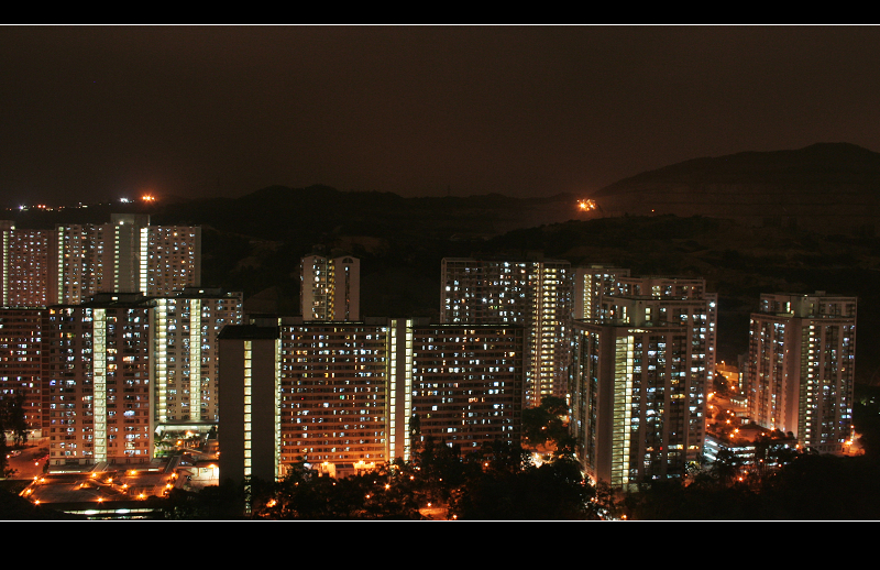 shun tin estate